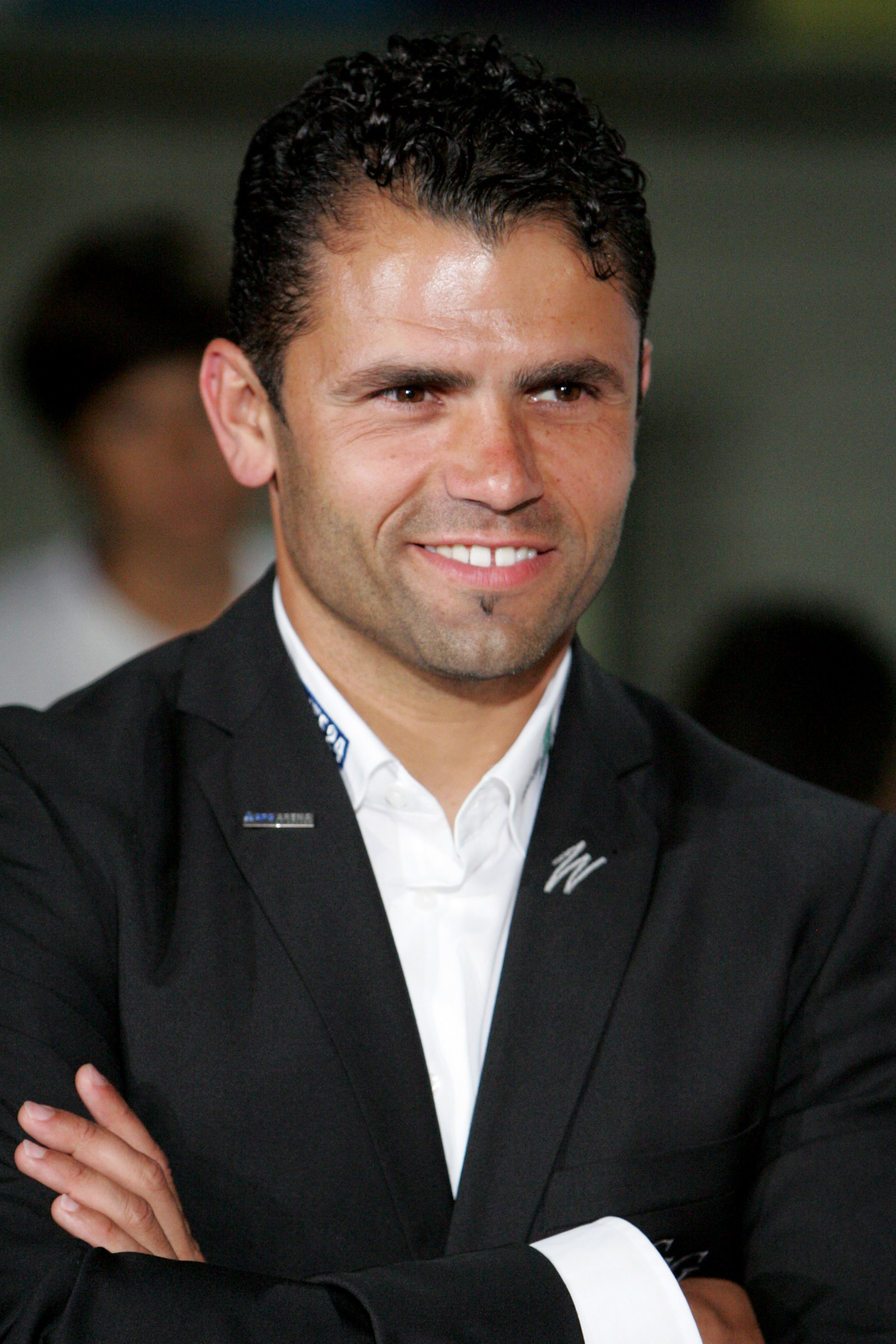 Uli Forte